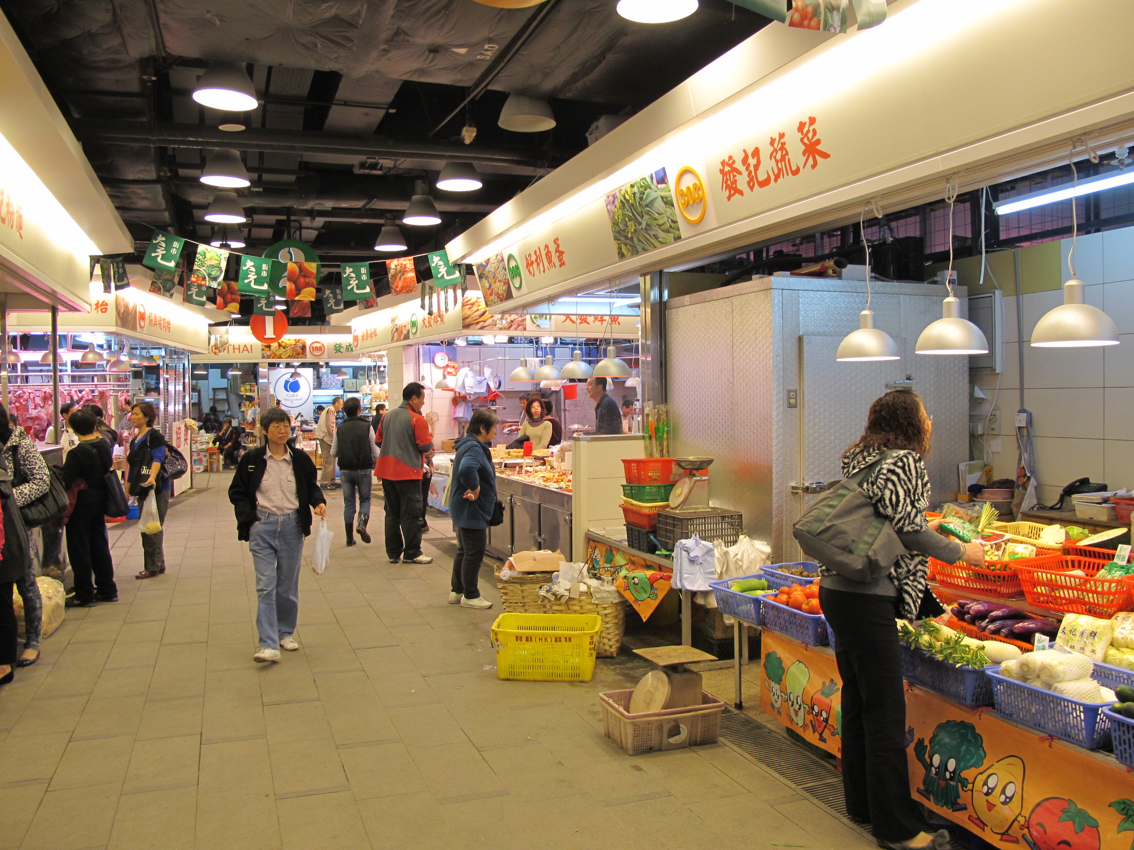 Tai Yuen Market Interior